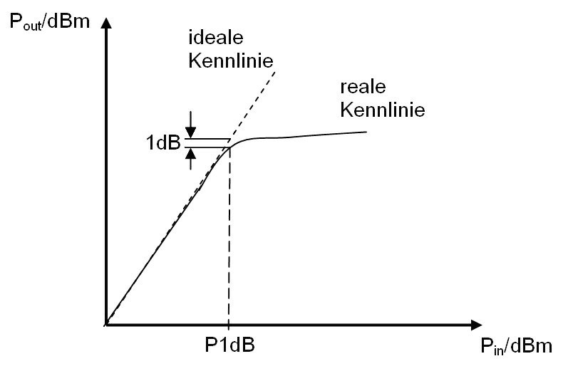 Darstellung des 1dB-Kompressionspunktes